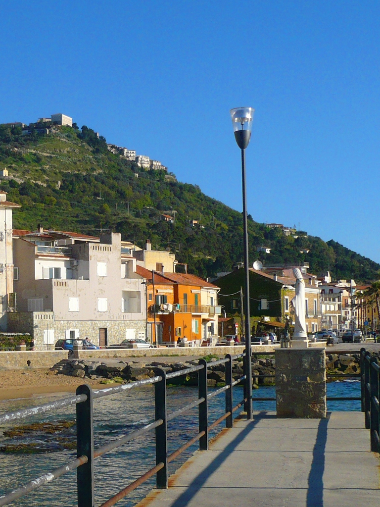 La statua della Madonna posta a punta dell'Inferno nei pressi della spiaggia dello Scario a Santa Maria di Castellabate (Salerno)